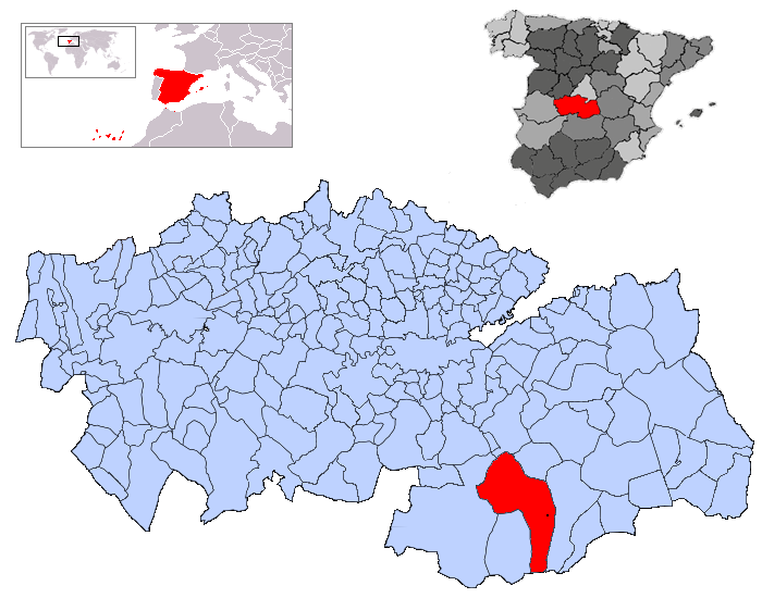 Camuñas en la provincia de Toledo